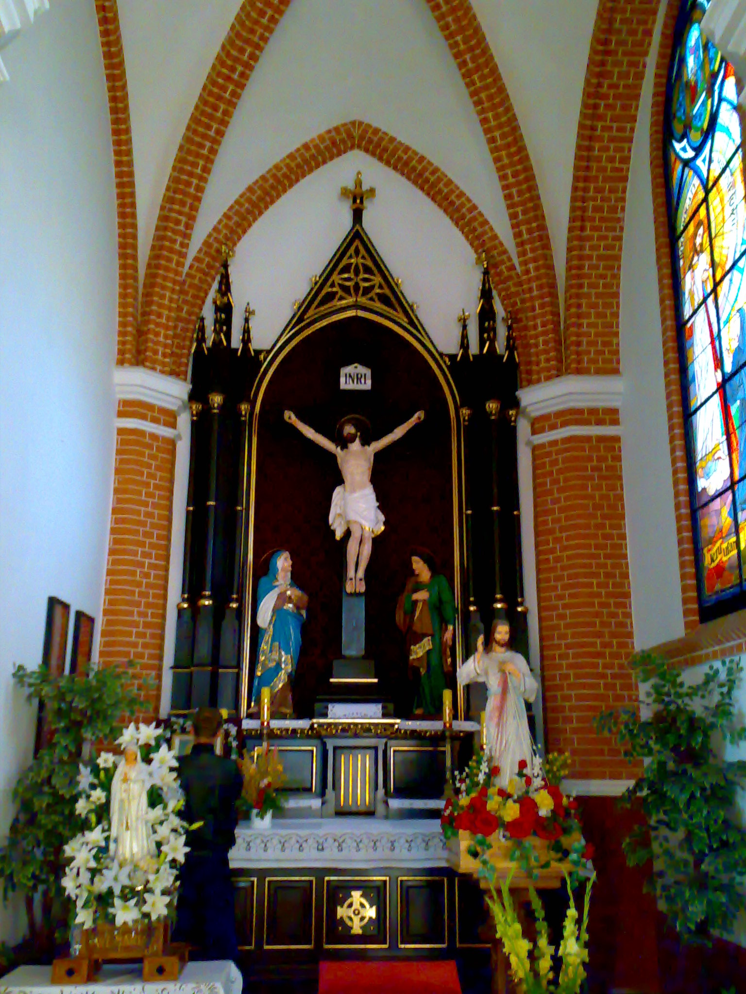 Chrystus ukrzyżowany